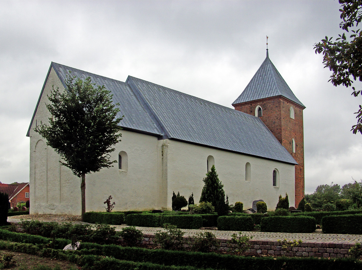 fra sydøst